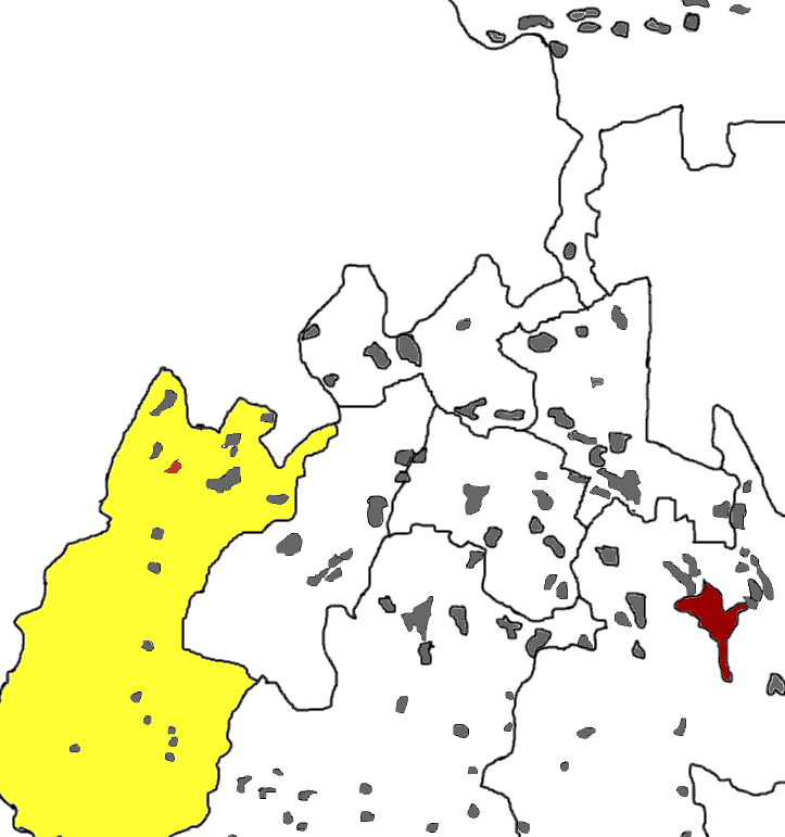 Ирон: os:Хæзнидон